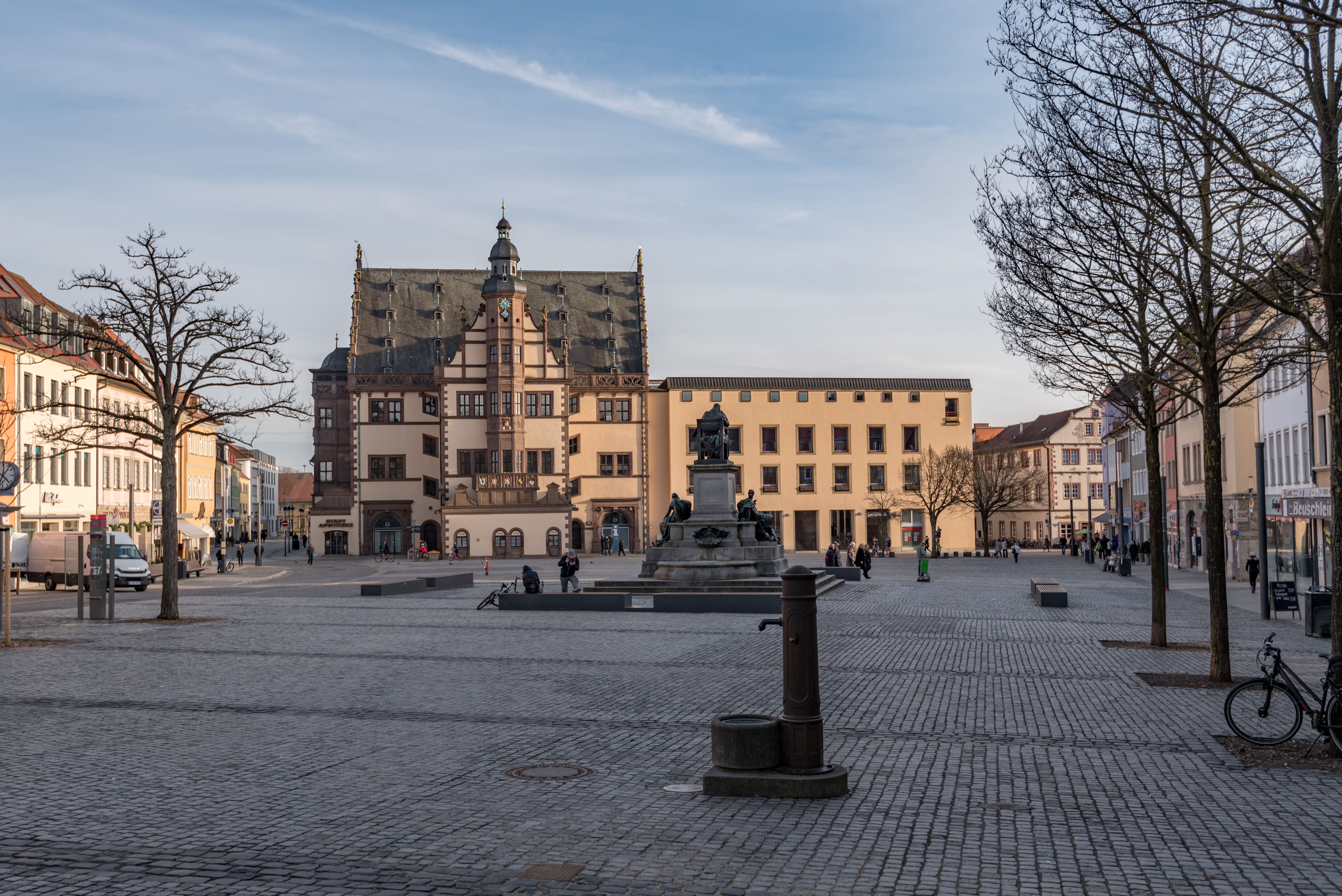 Schweinfurt, Markt, Rathaus